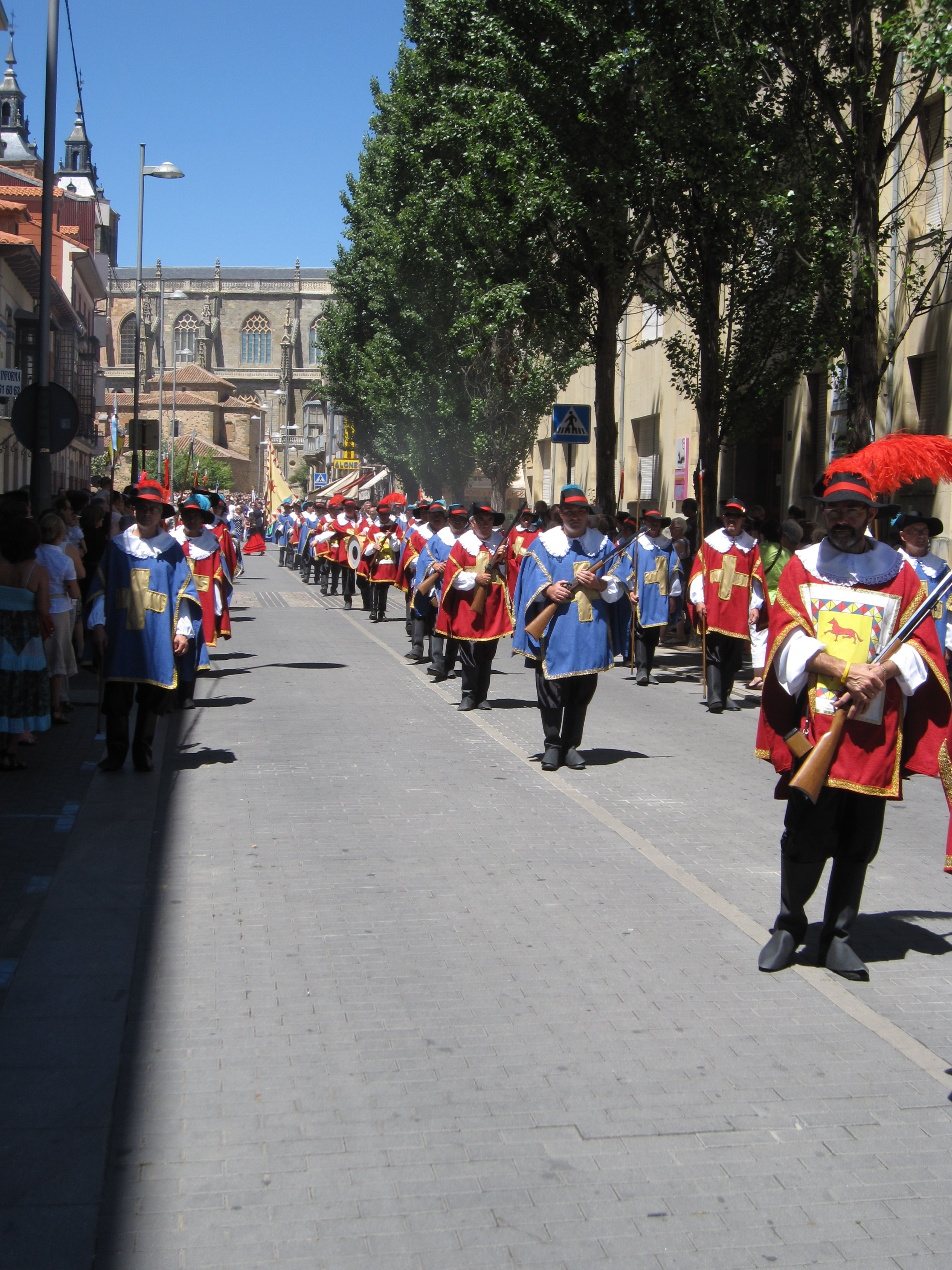 Parte de la comitiva de la Zuiza, en su edición de 2010. Astorga (León, España).